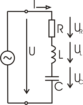 schéma pro sériový rezonanční obvod